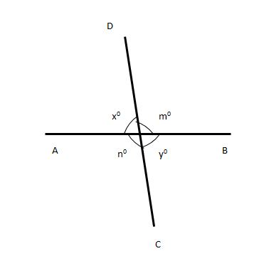 नेपाली: शिर्षाभिमुख कोण